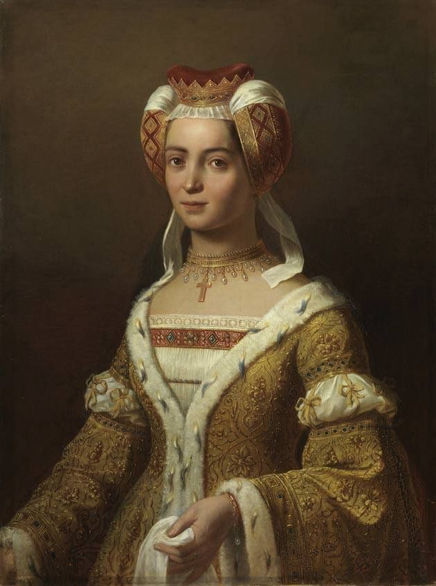 Gräfin Anna von Veldenz (um 1390-1439), Erbtochter des Grafen Friedrich III. von Veldenz, Gemahlin des Pfalzgrafen Stephan seit 1410